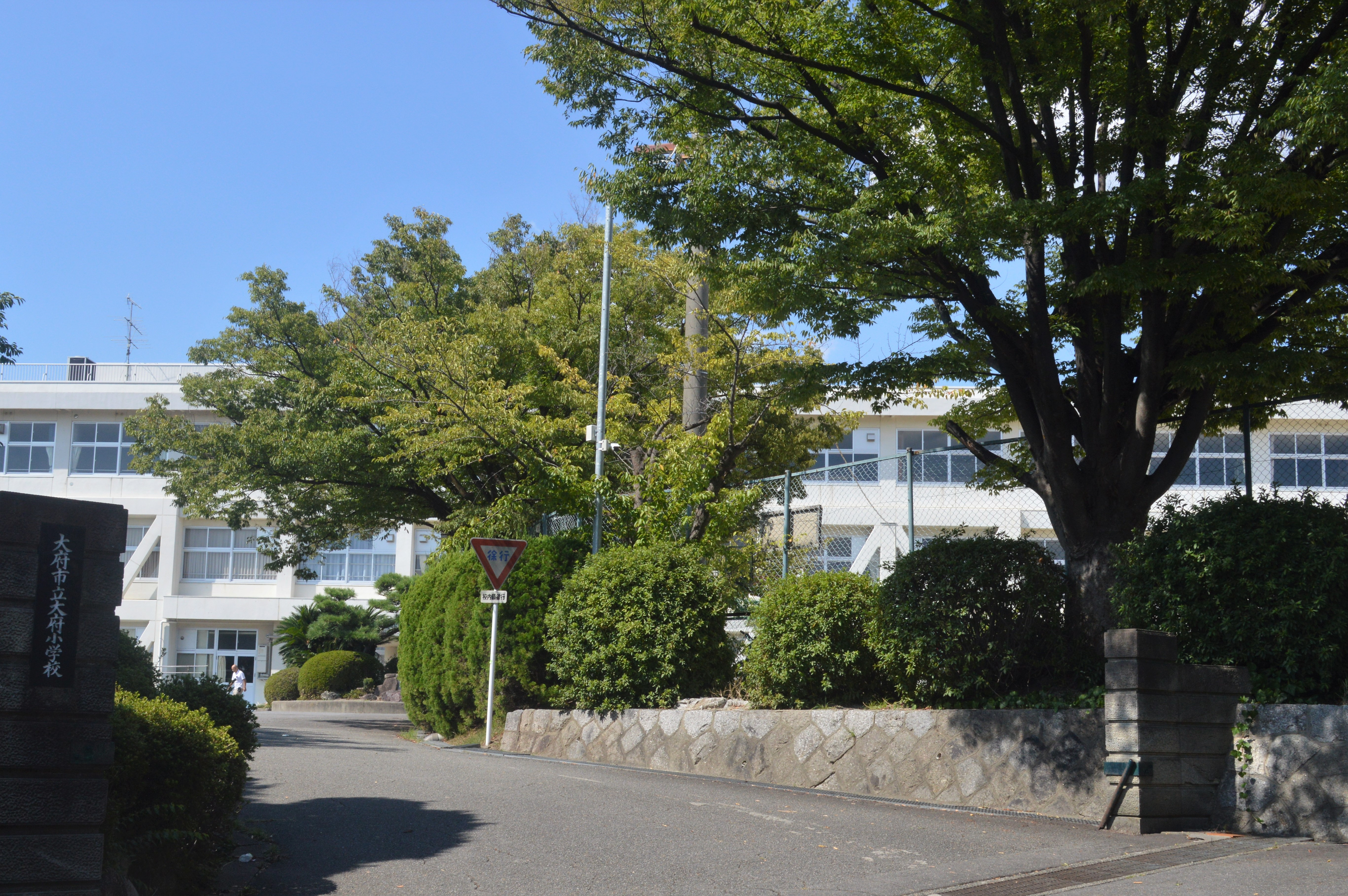 愛知県大府市の大府市立大府小学校。